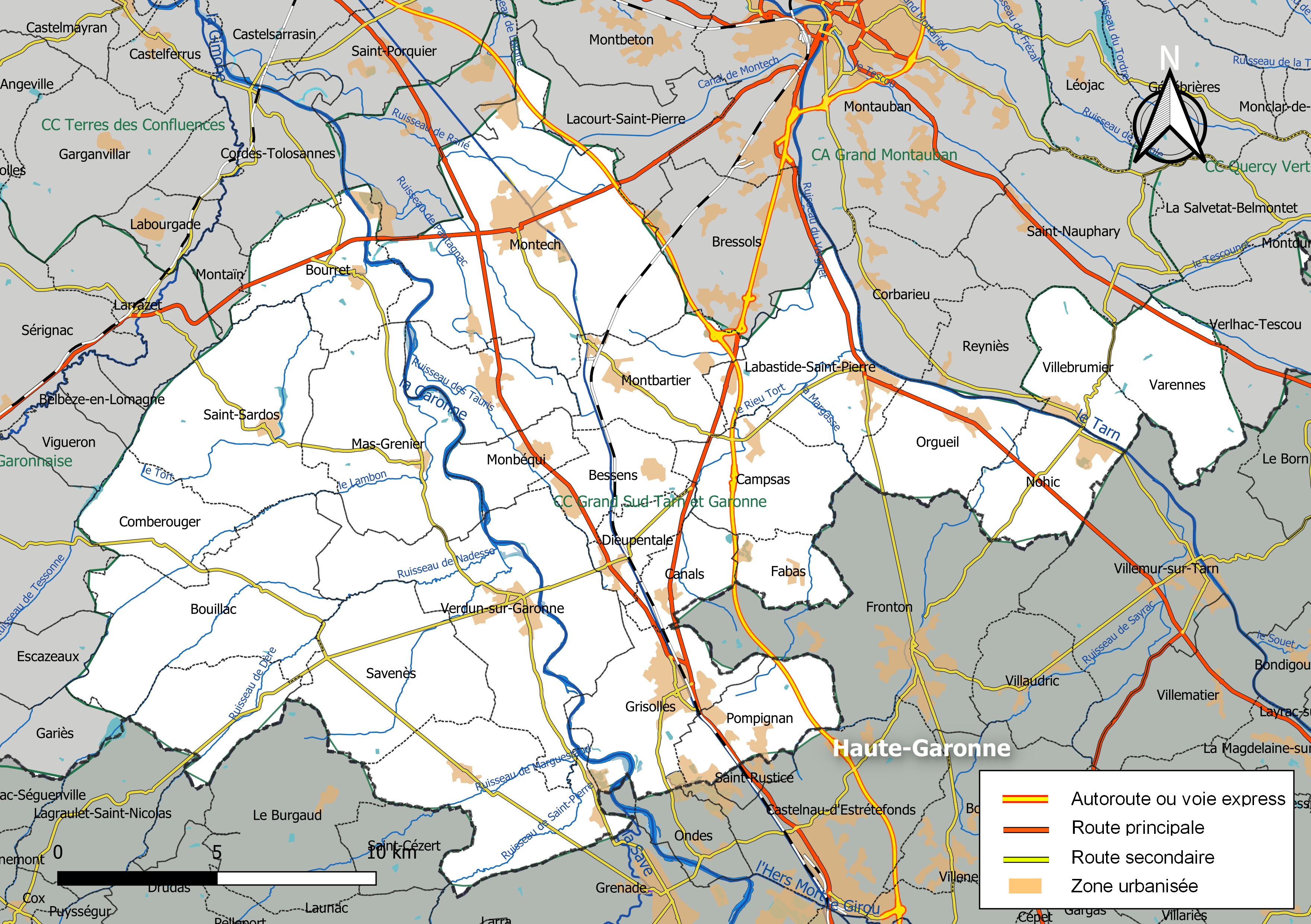 Carte géographique de la Communauté de communes Grand Sud Tarn et Garonne, département de Tarn-et-Garonne, France. Composition au 1er janvier 2019.